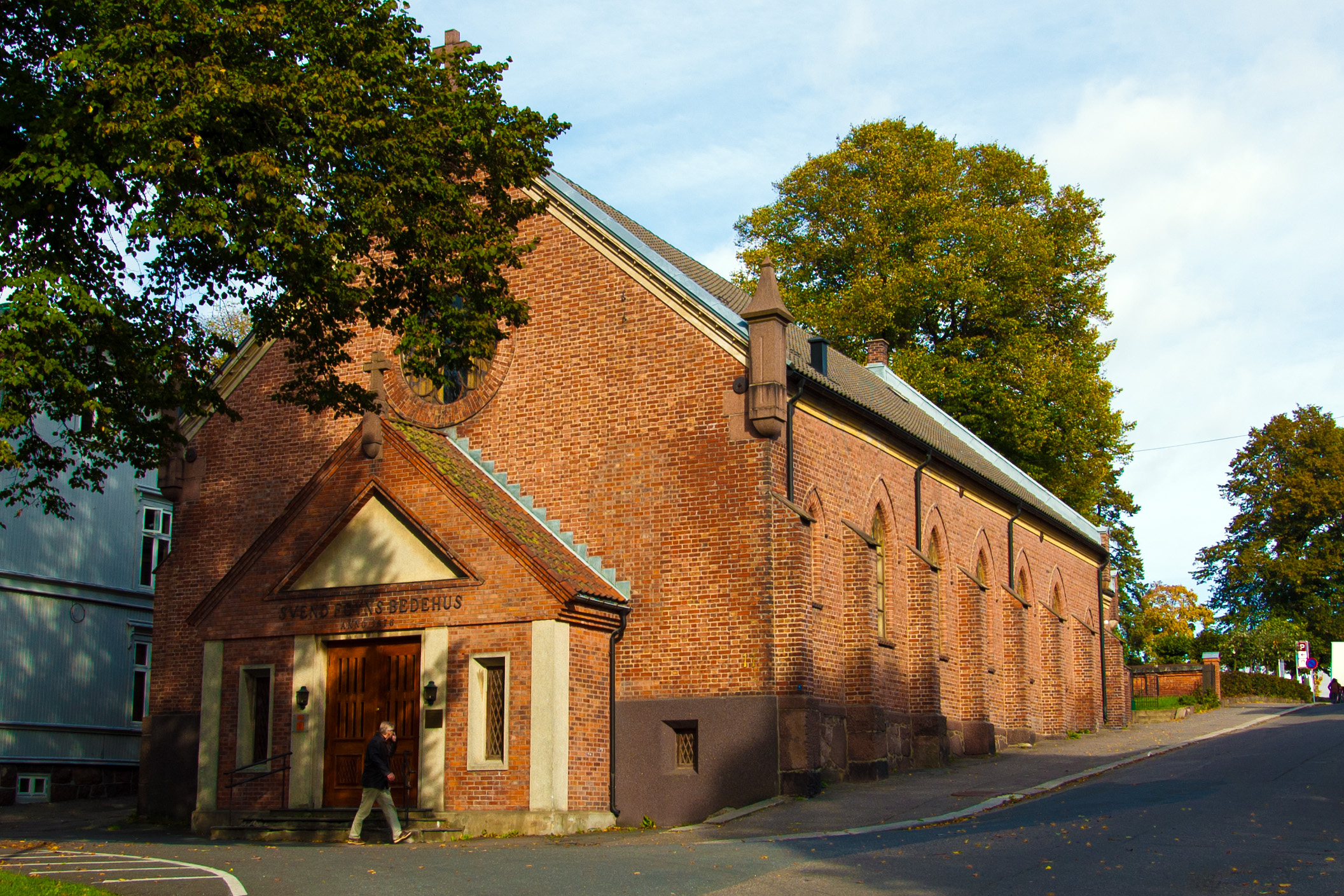 Svend Foyns Bedehus i Tønsberg